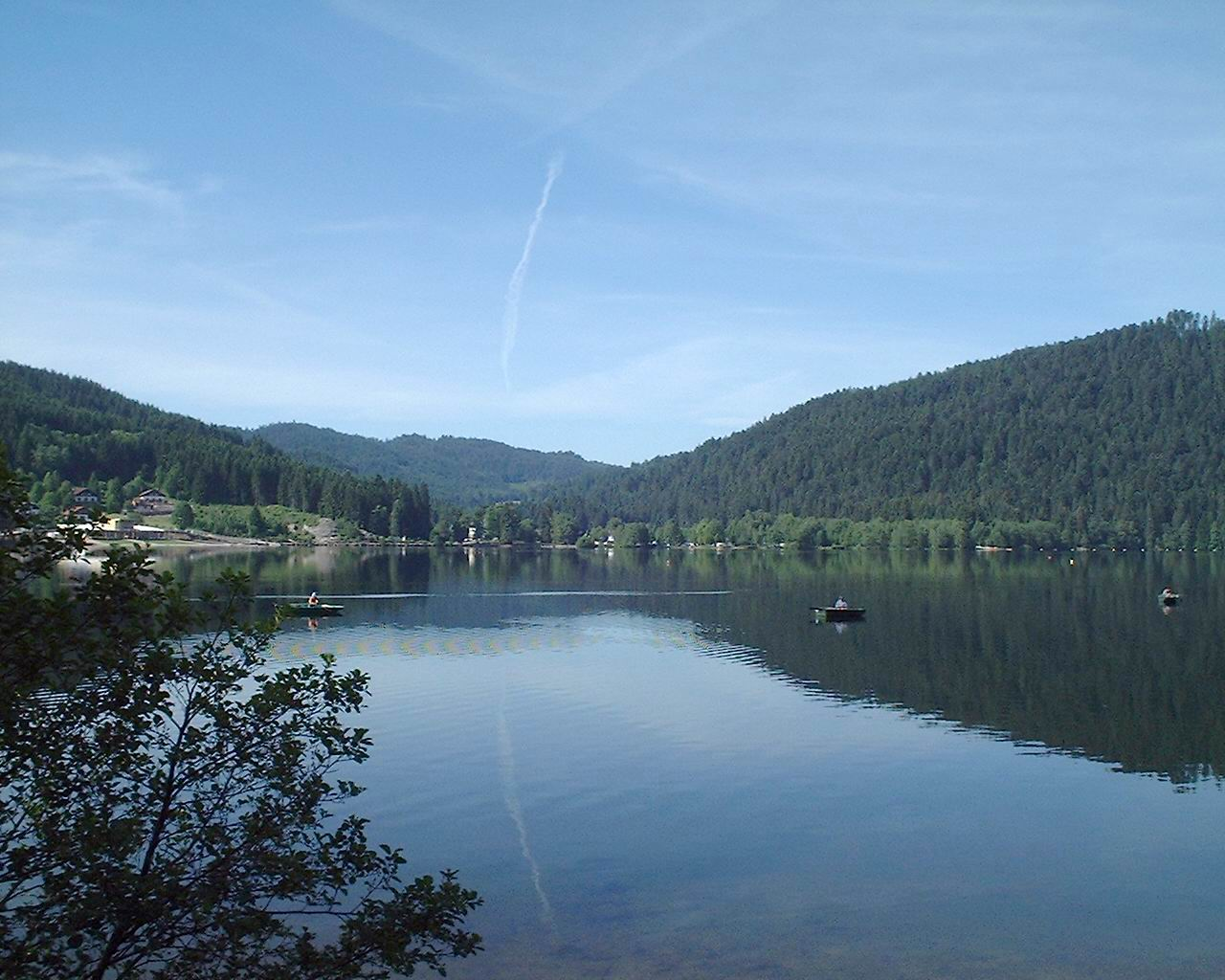 Le Lac de Gerardmer en 2001